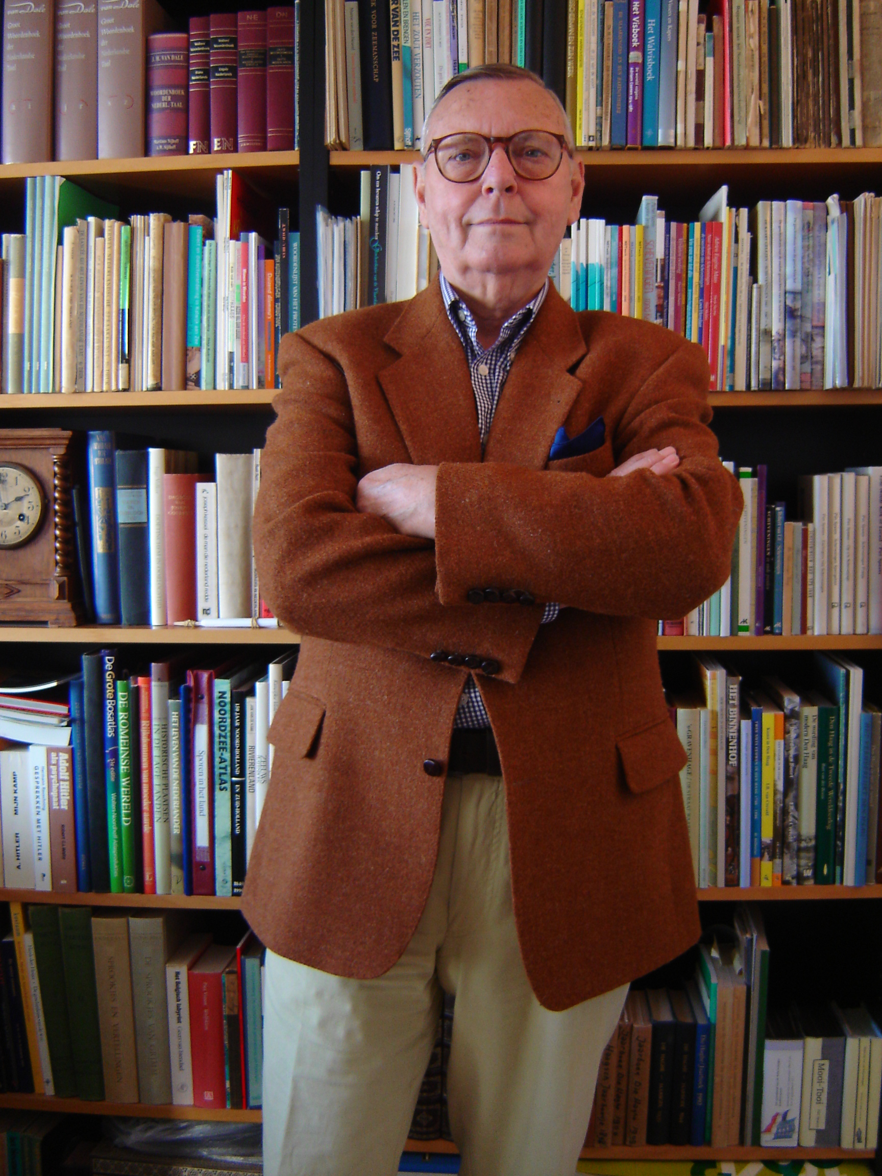 Afbeelding van de auteur